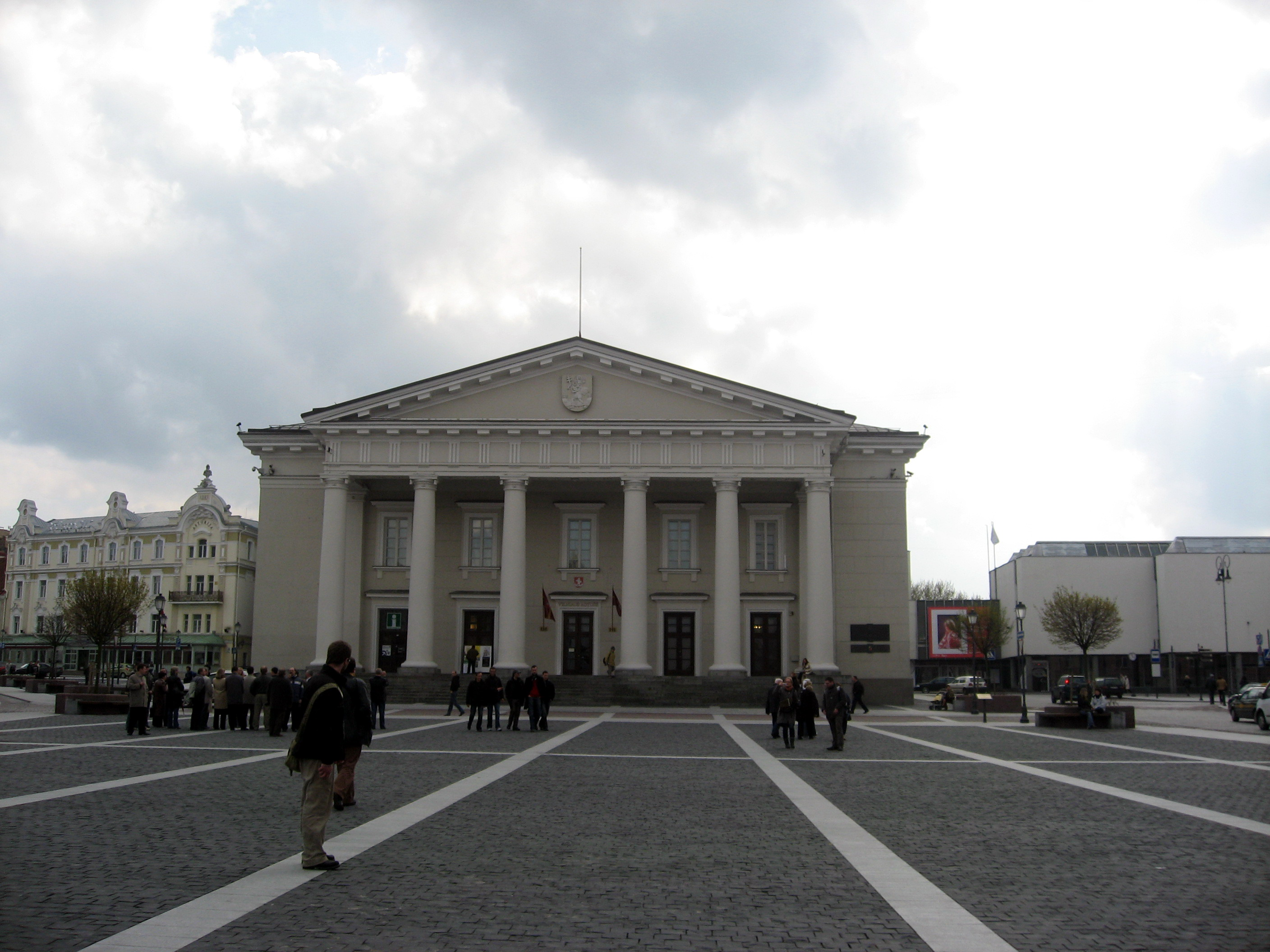 Vilnius, radnice